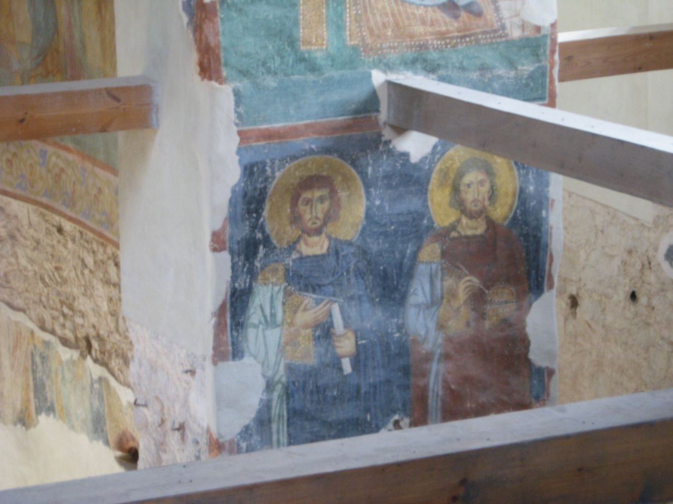 Фрески собора Антониева монастыря в Новгороде.